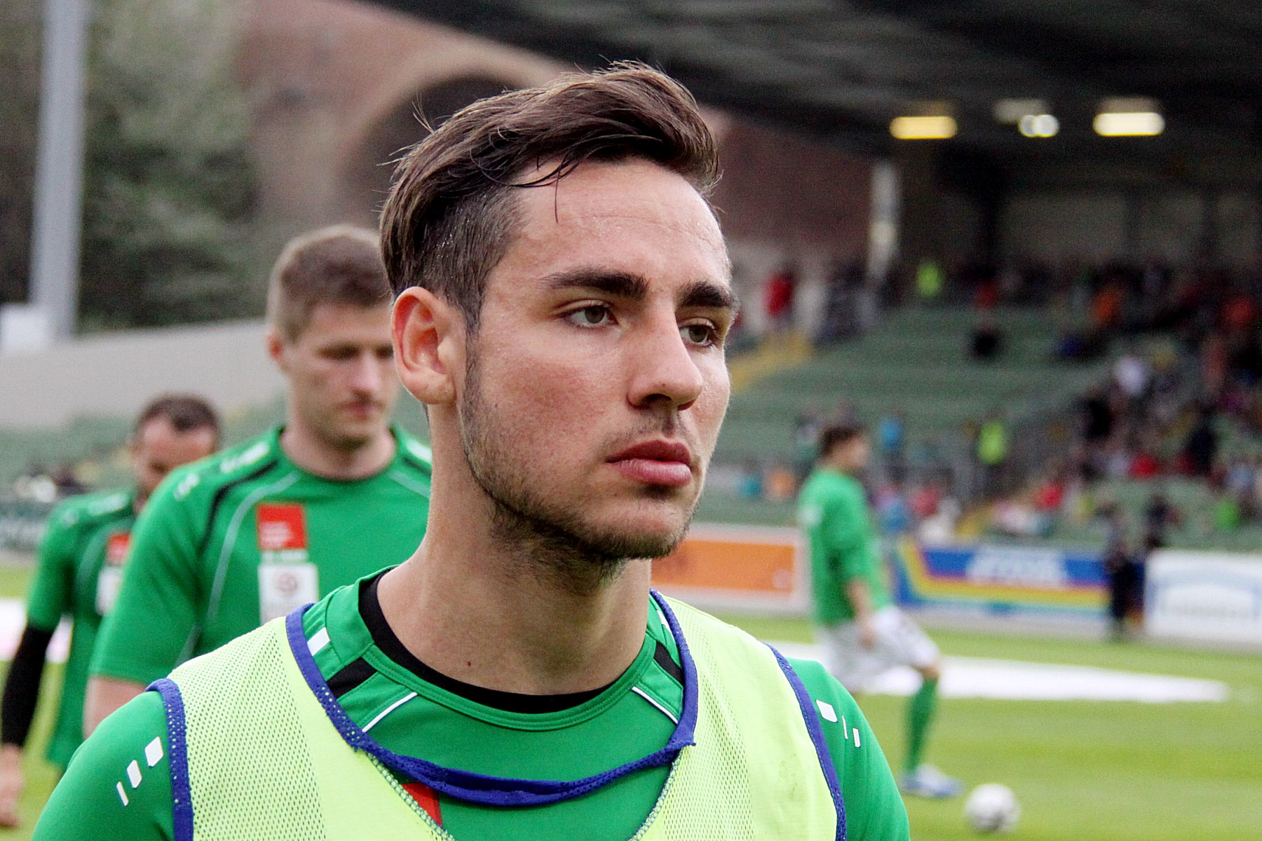 Meisterschaftsspiel der österreichischen Bundesliga: SV Mattersburg gegen FC Wacker Innsbruck am 7. April 2013 (0:0)] im Mattersburger Pappelstadion. - Das Foto zeigt Christian Schilling (FC Wacker Innsbruck). Object location47° 44′ 21.66″ N, 16° 24′ 23.13″ E